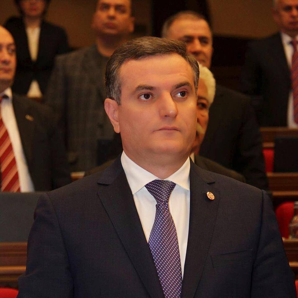 Արտակ Զաքարյան